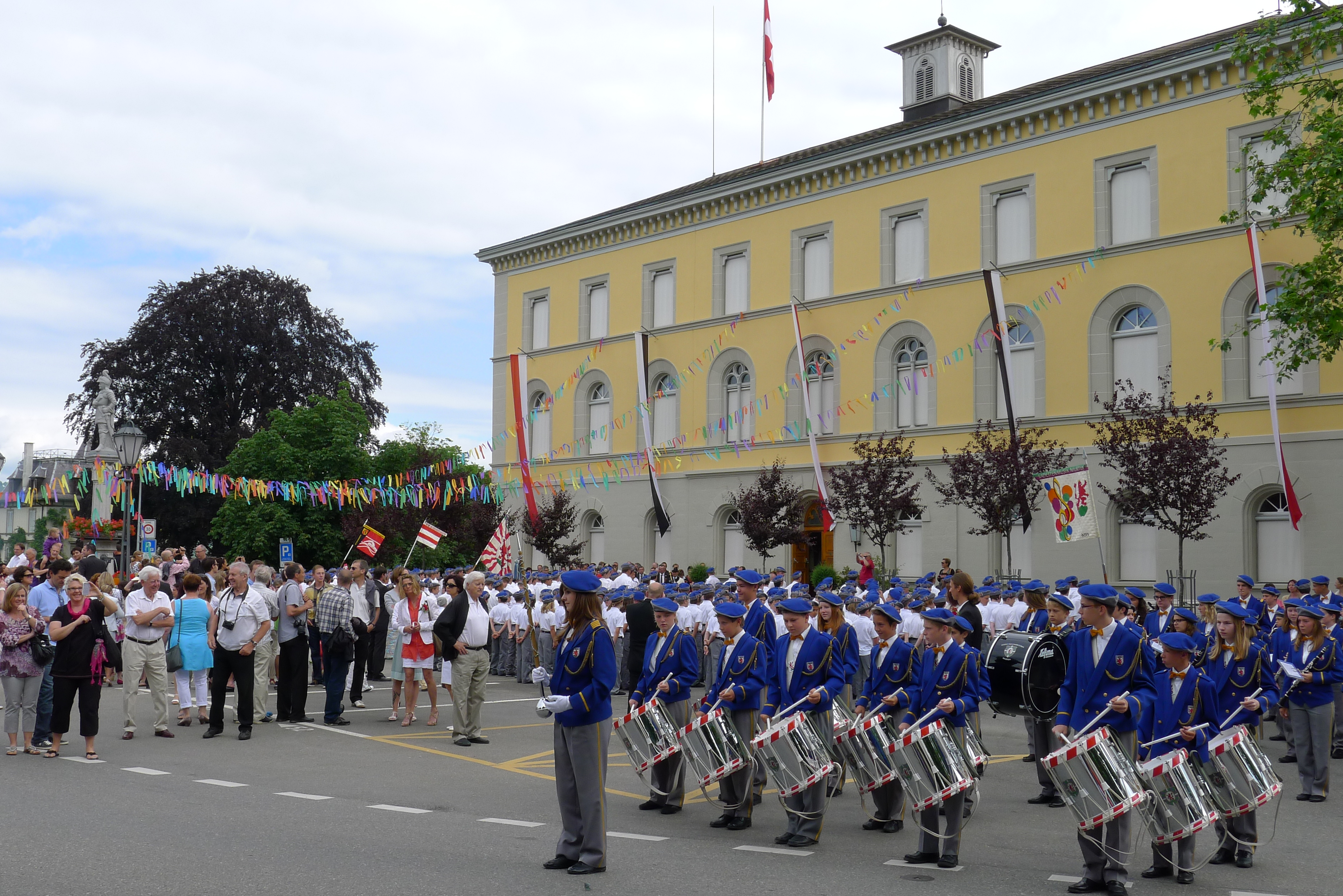 Die Murtener Soli beginnt traditionsgemäß vor der Primarschule Berntor. Das Foto zeigt diese Szene am 22.06.2013.